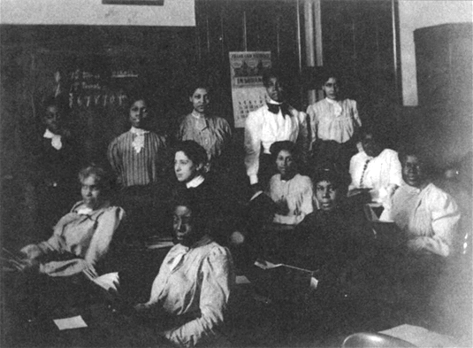 Boston, Massachusetts